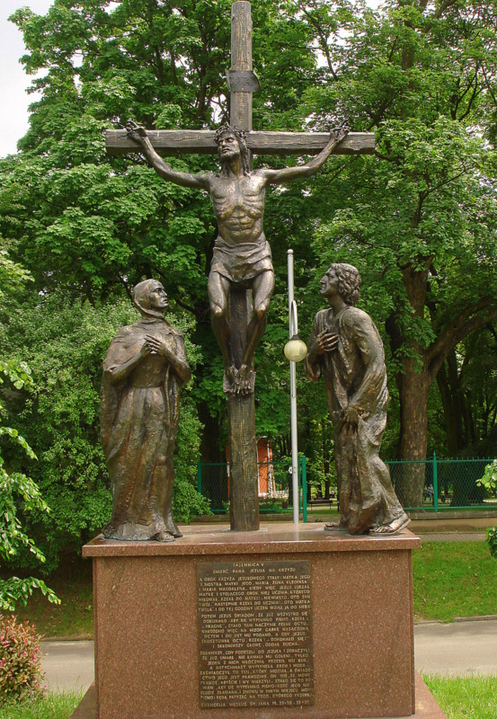 Częstochowa, zespół klasztorny paulinów na Jasnej Górze